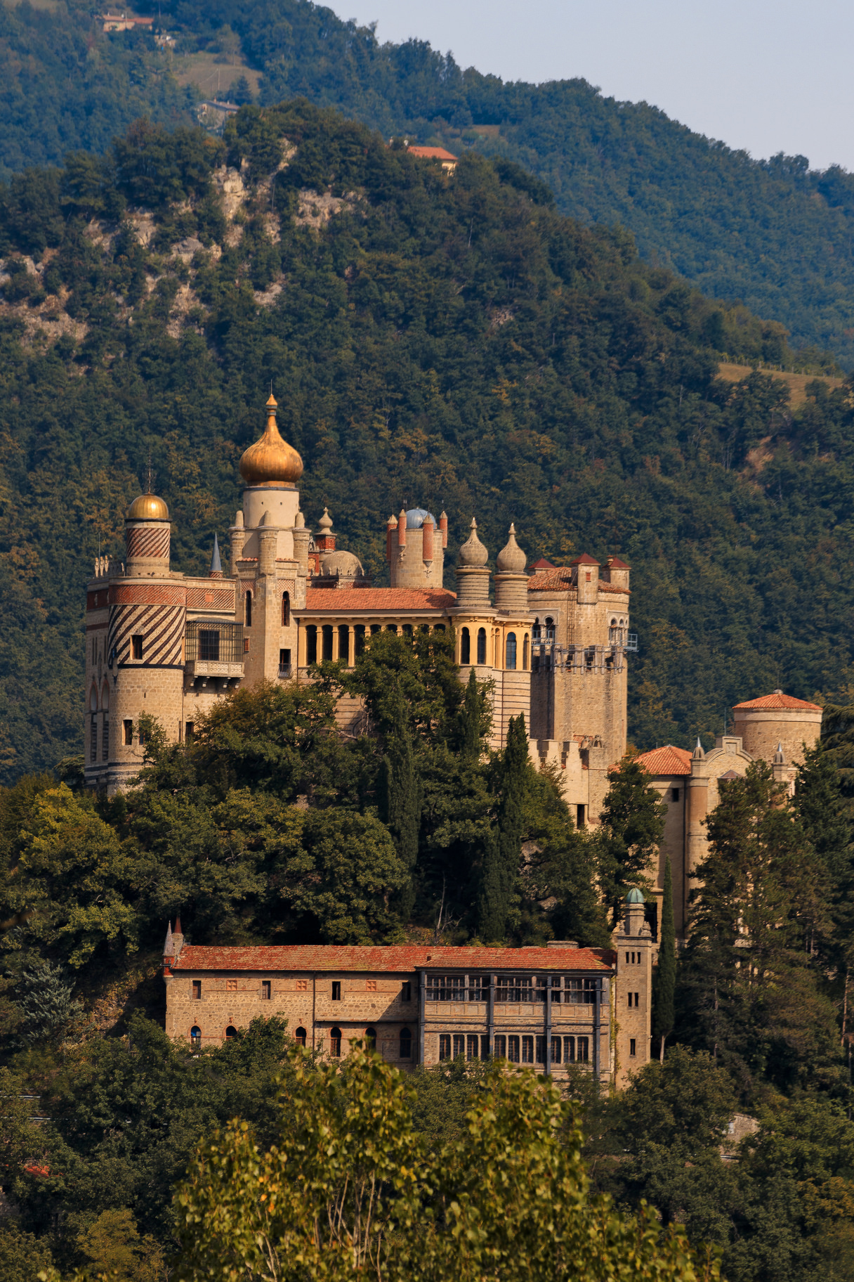 Rocchetta Mattei This is a photo of a monument which is part of cultural heritage of Italy.